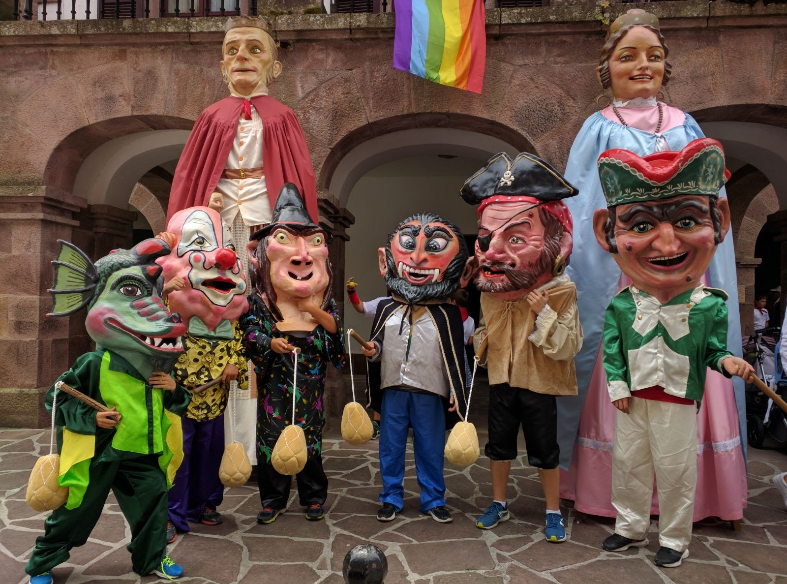 San Pedron ospatzen dira herriko bestak eta egunero ateratzen dira buruhaundiek herrian barna umeak harrapatzera. Erraldoiak herriko desfileetan protagonista izaten dira. Irudi hau Wikibizi kanpainaren baitan igo da, Euskal Wikilarien Kultura Elkarteak 2020an deitutako argazki lehiaketa hirukoitza. Helburua, Euskal Herria hobeto ezagutzen laguntzea da.Lagundu zuk ere irudi hau dagokion artikuluetan txertatzen.